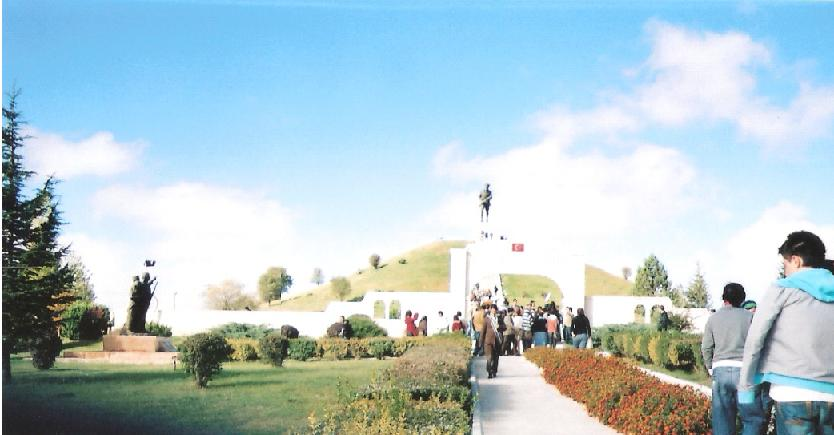 Dumlupınar Şehitlik